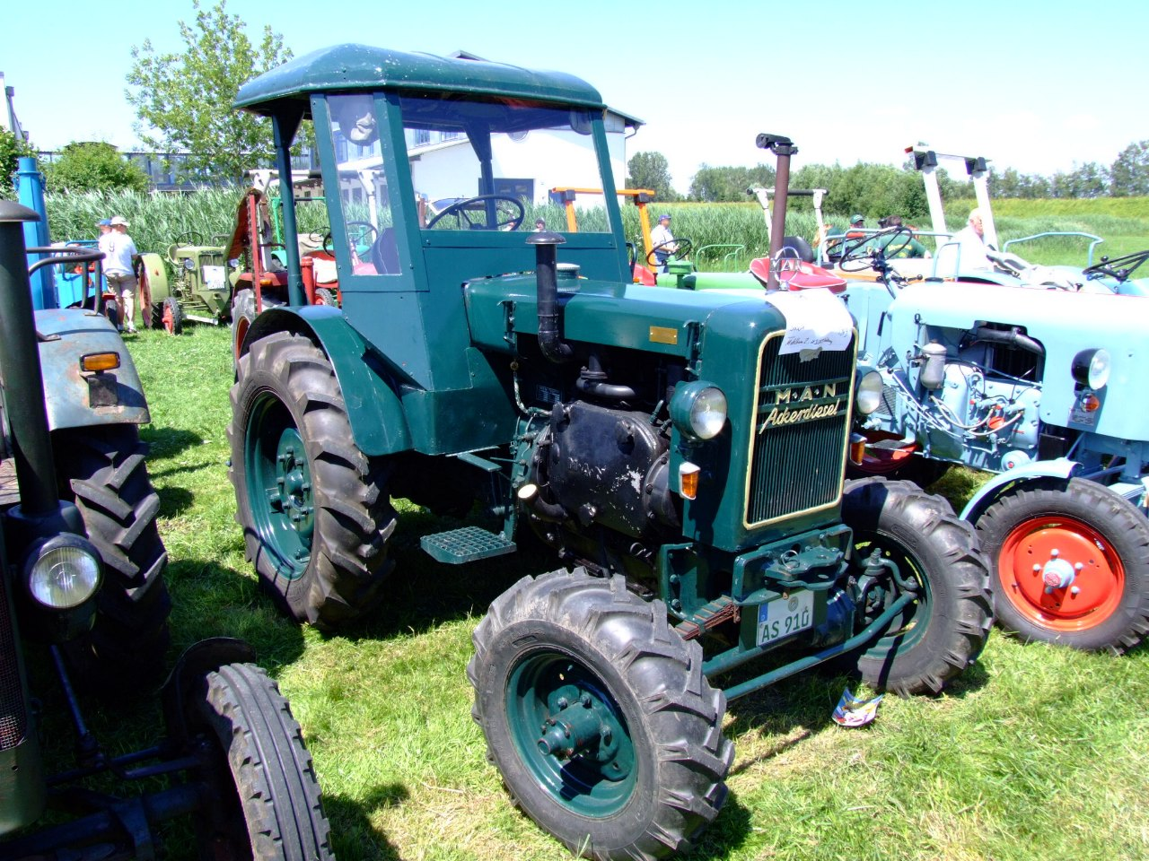 Quelle: selbst fotografiert, 07/2006 Fotograf: Späth Chr.